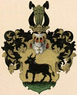 Tiesenhauseni suguvõsa aadli- ja parunivapp